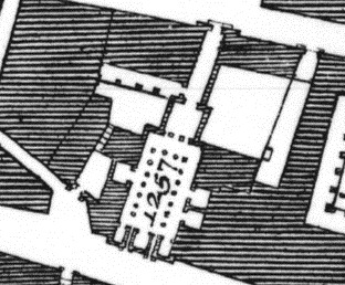 Italiano